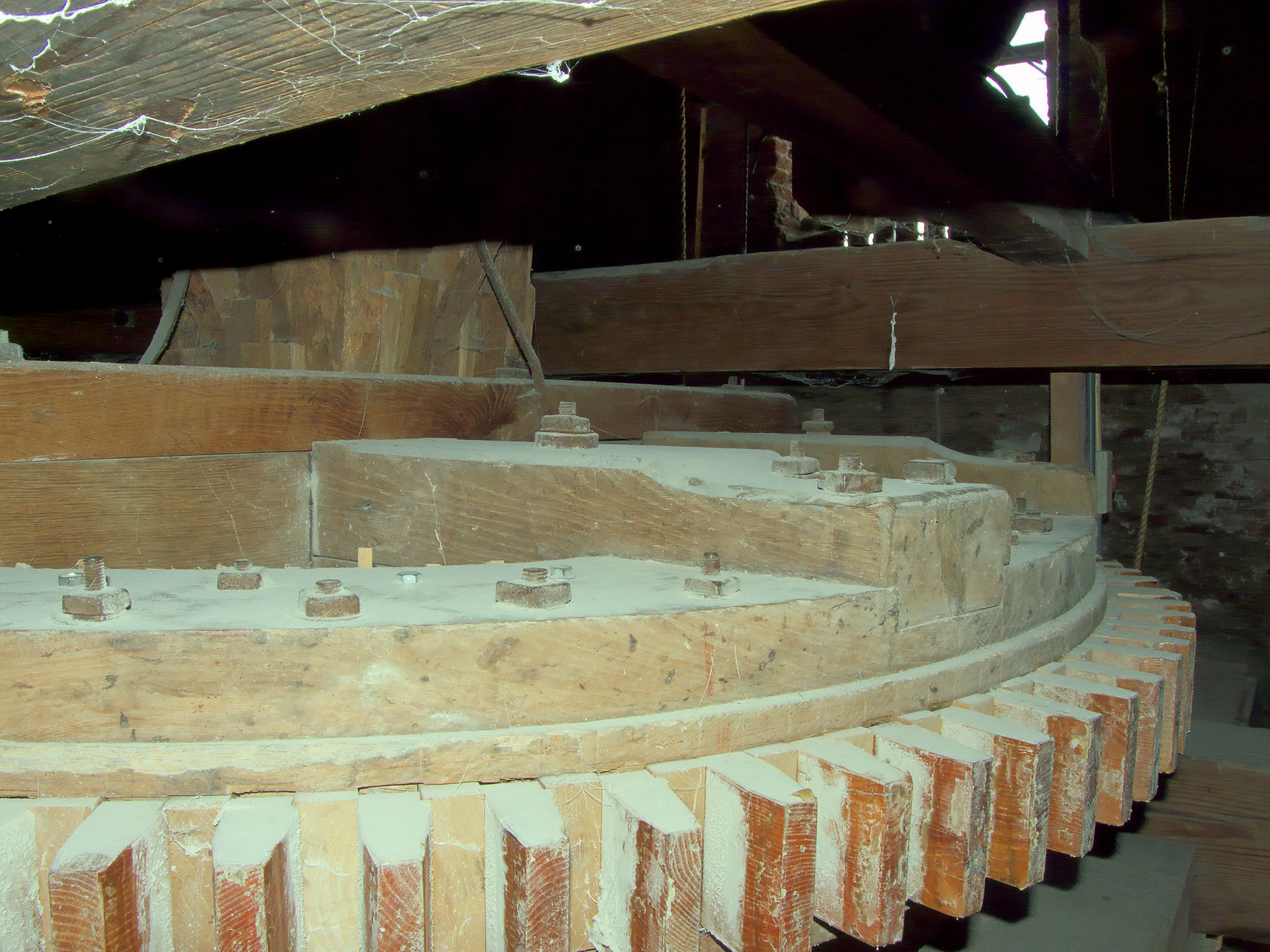 Molen De Hoop Garderen, kamvorm spoorwiel